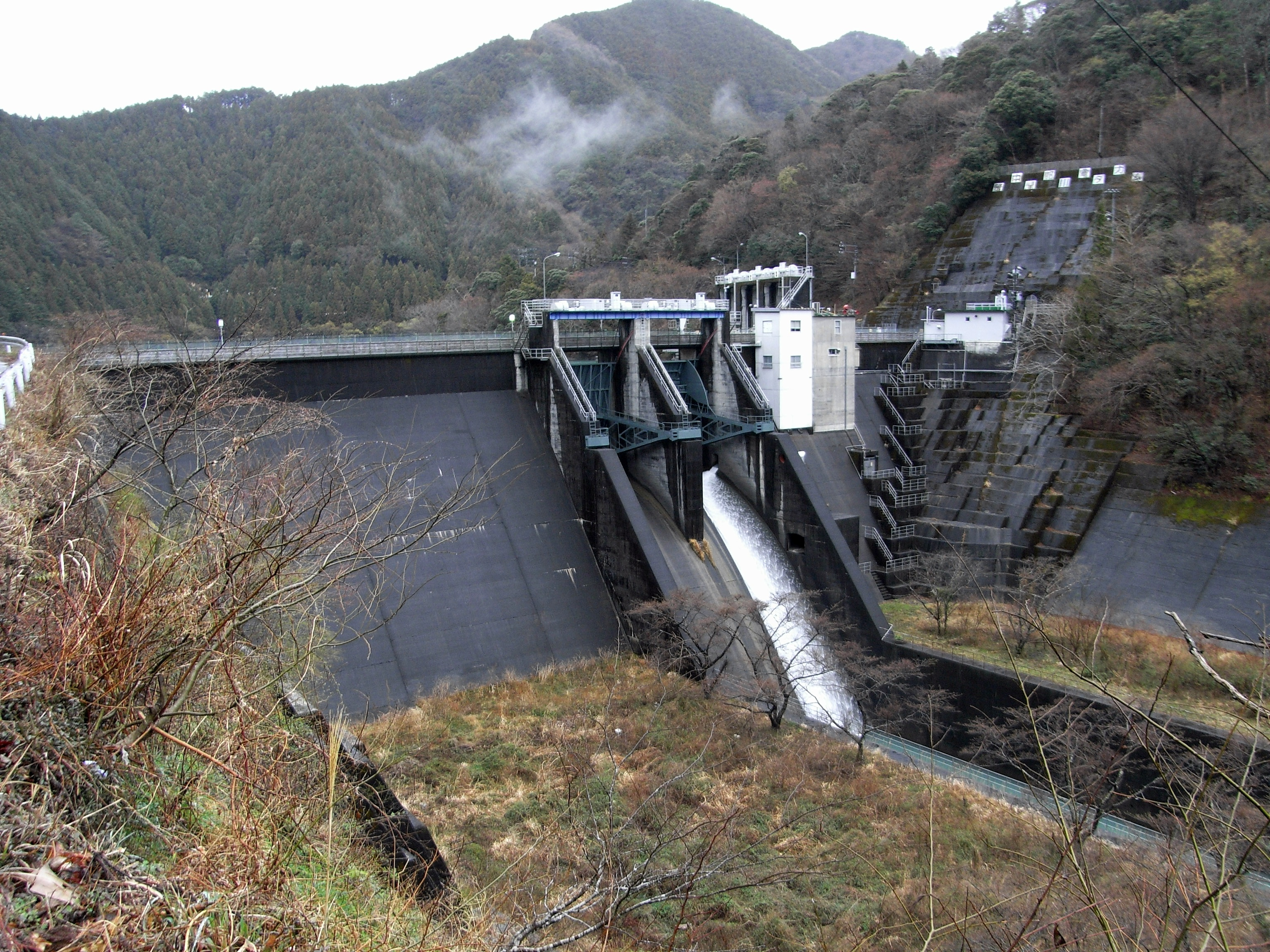 Dam